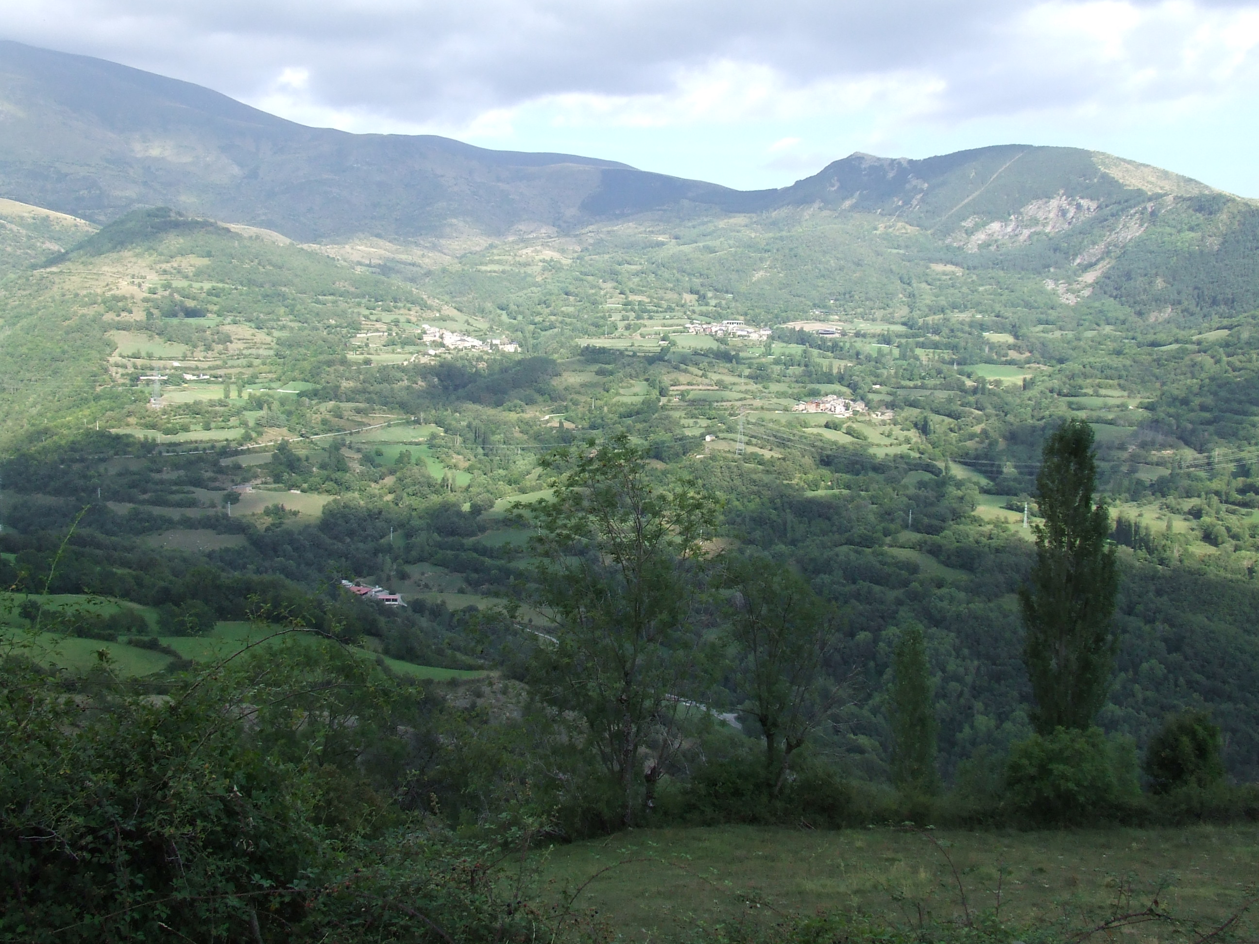 La Coma (Mont-ros, la Torre de Cabdella, Pallars Jussà)